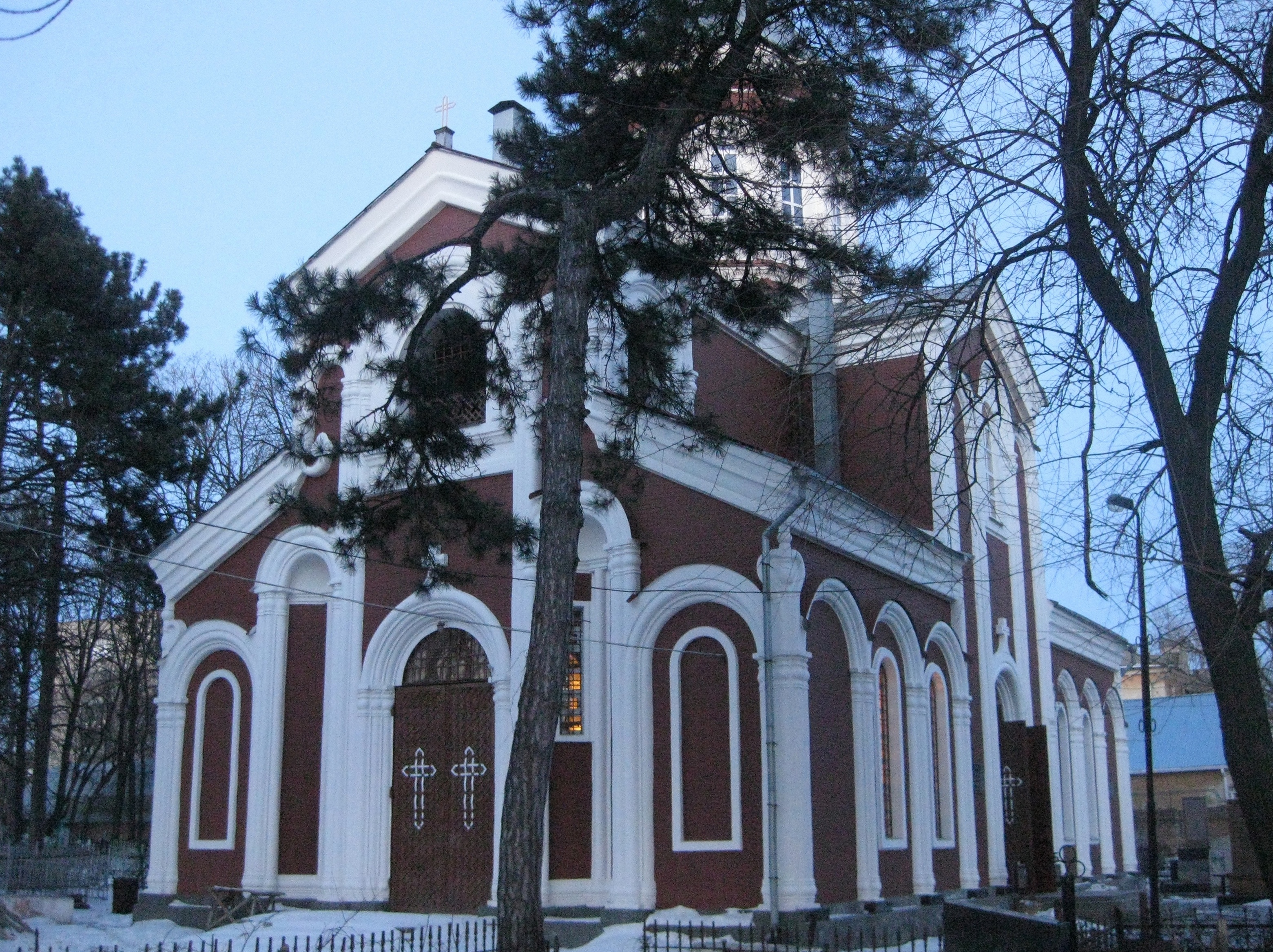 Церковь св. Карапета в Ростове, вид с юго-запада